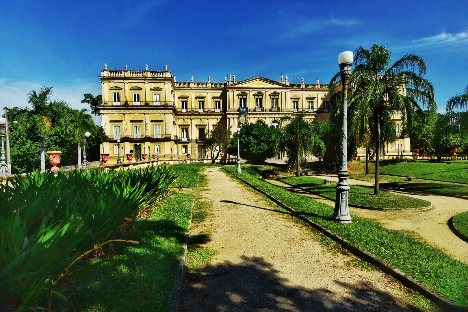 Quinta da Boa Vista Palácio de São Cristovão Museu Nacional RJ foto tirada pelo Fotógrafo Campineiro Claudinei Fortes para ocasião dos 200 anos da Aclamação de D. João VI no Brasil. MUSEU HISTÓRICO NACIONAL.